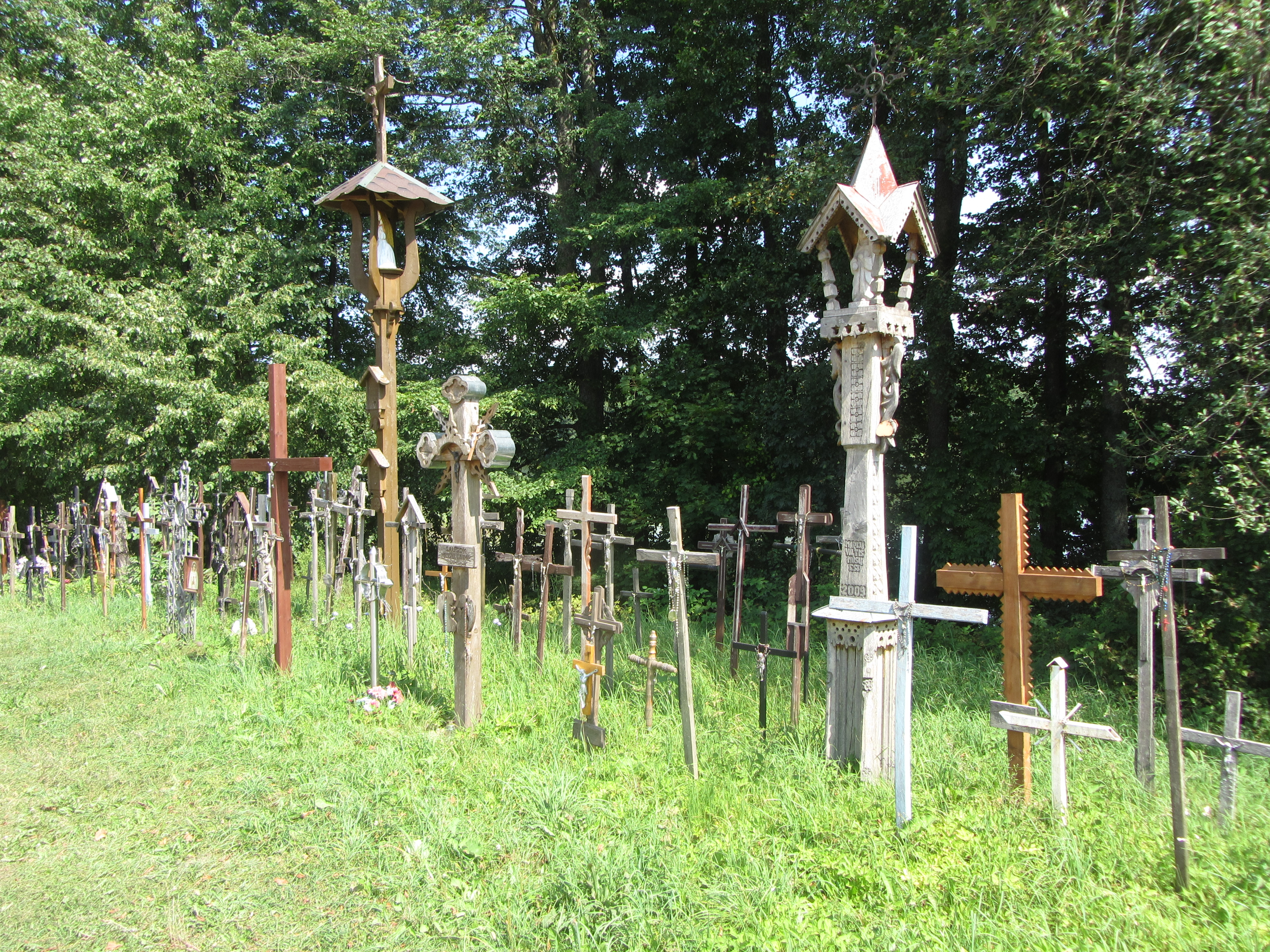 Imbrado sen., Lithuania